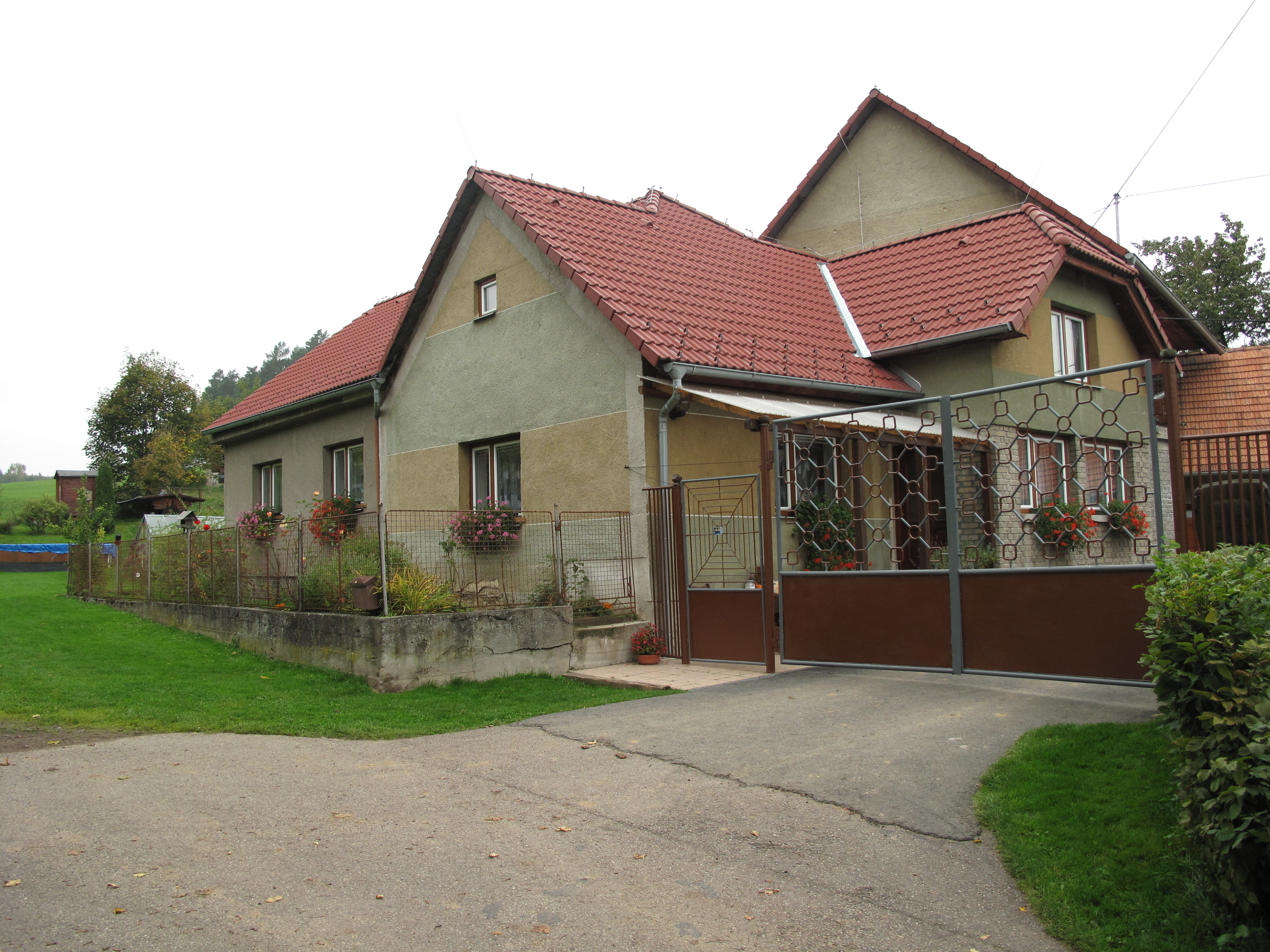 Dům v Javoru. Okres Tábor, Česká republika.